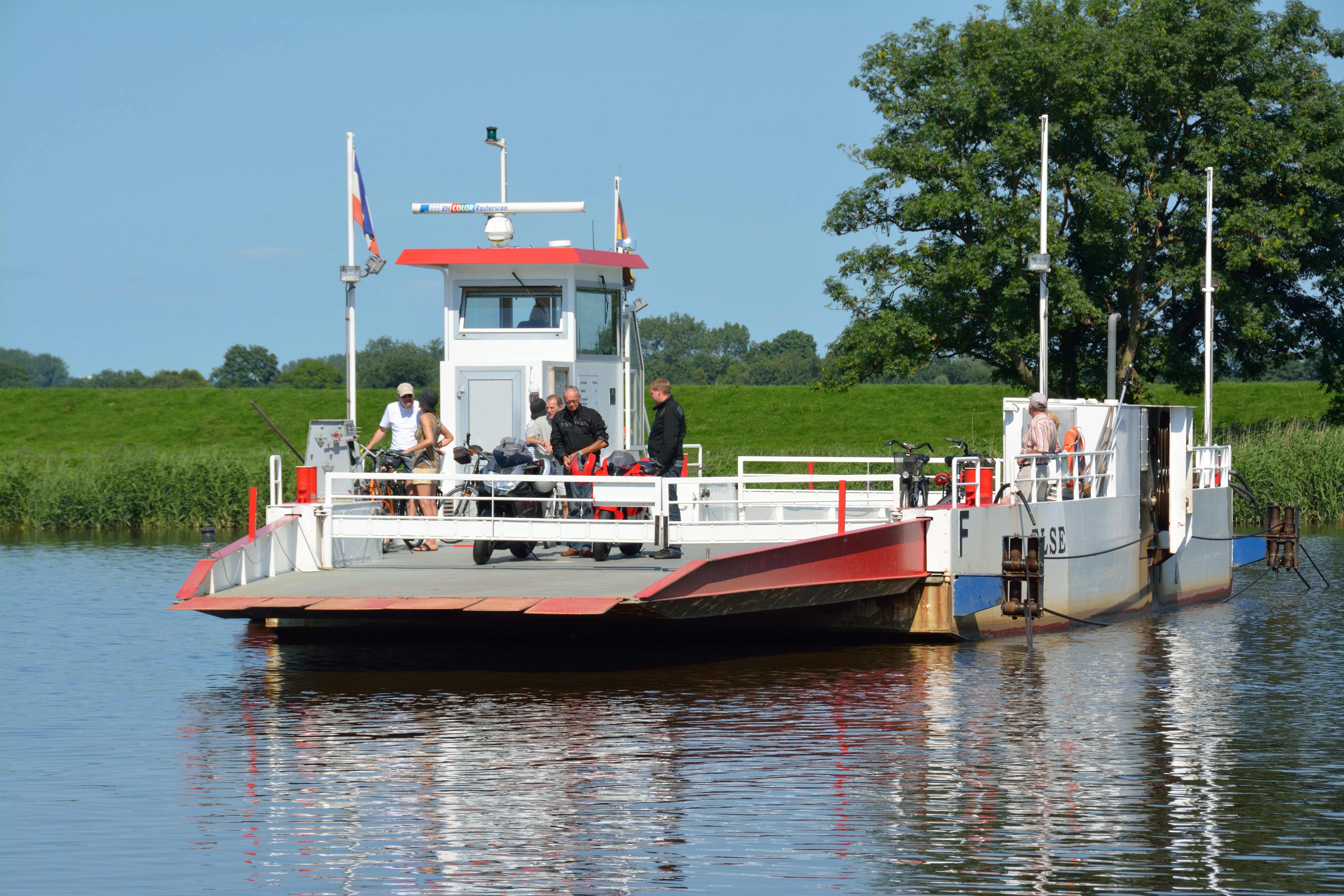 Die Störfähre Else, eine der letzten Seilfähren Deutschlands